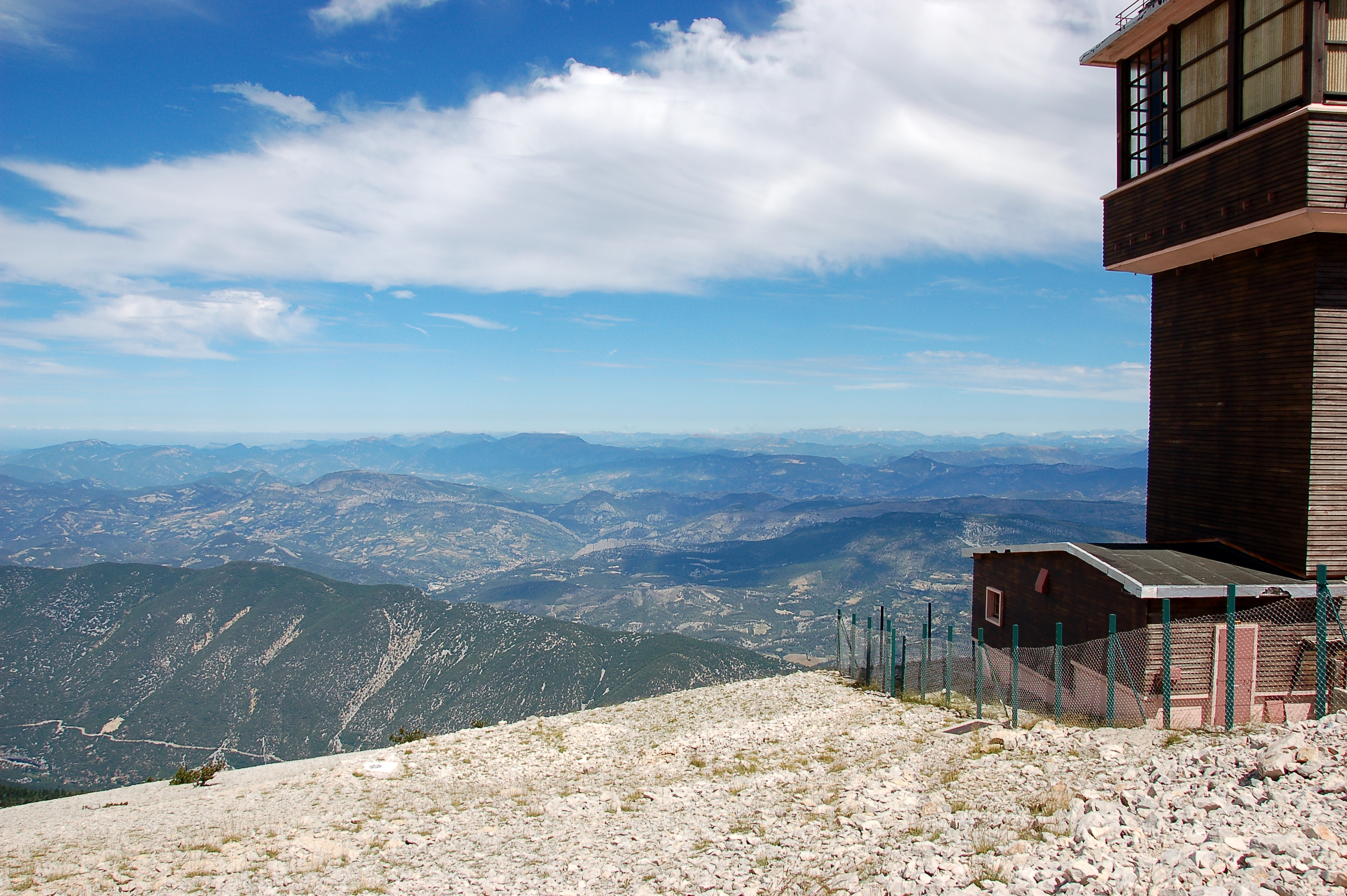 Mont Ventoux